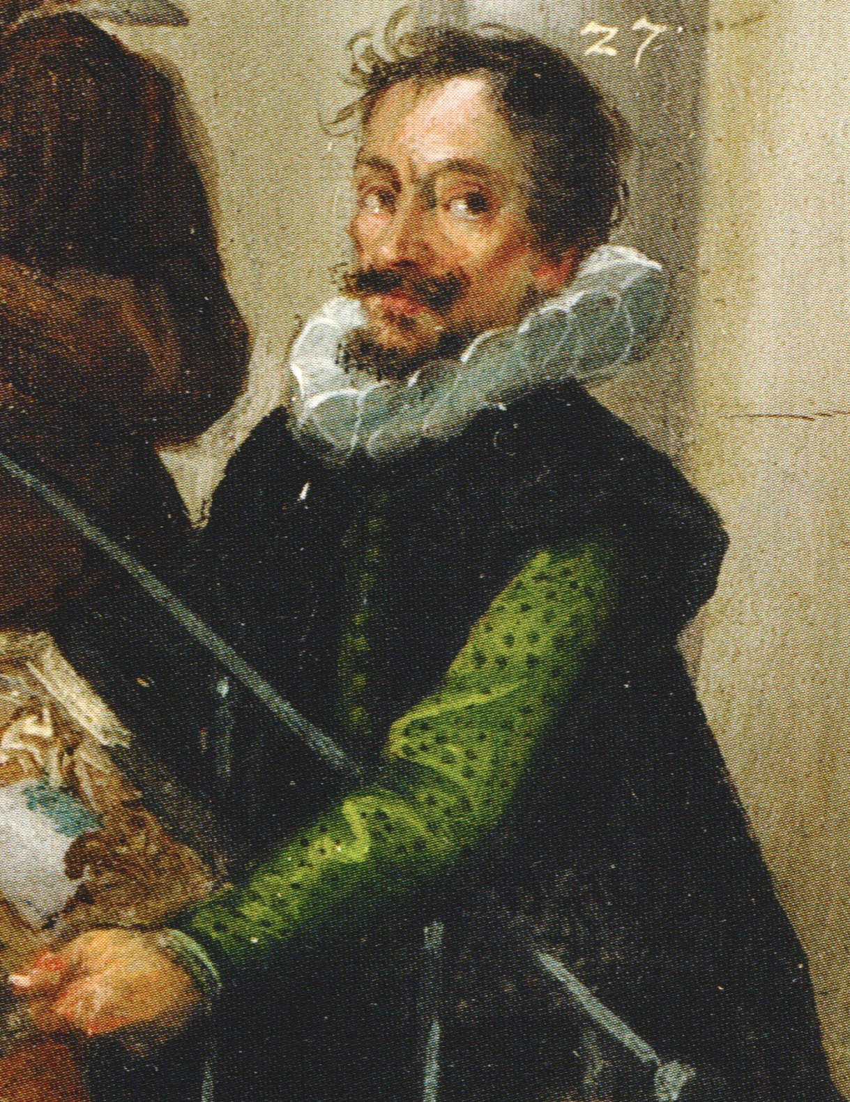 Selbstbildnis von Anton Mozart, Ausschnitt aus dessen Gemälde "Die Übergabe des Pommerschen Kunstschranks an Philipp II. von Pommern".